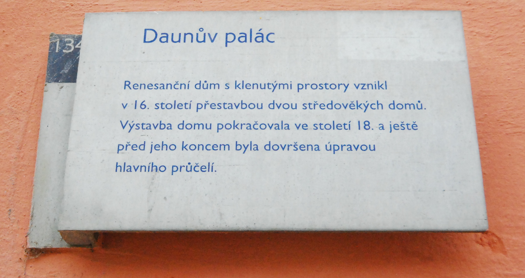 Tafel am Palais Daun am Masaryk náměstí in Znojmo